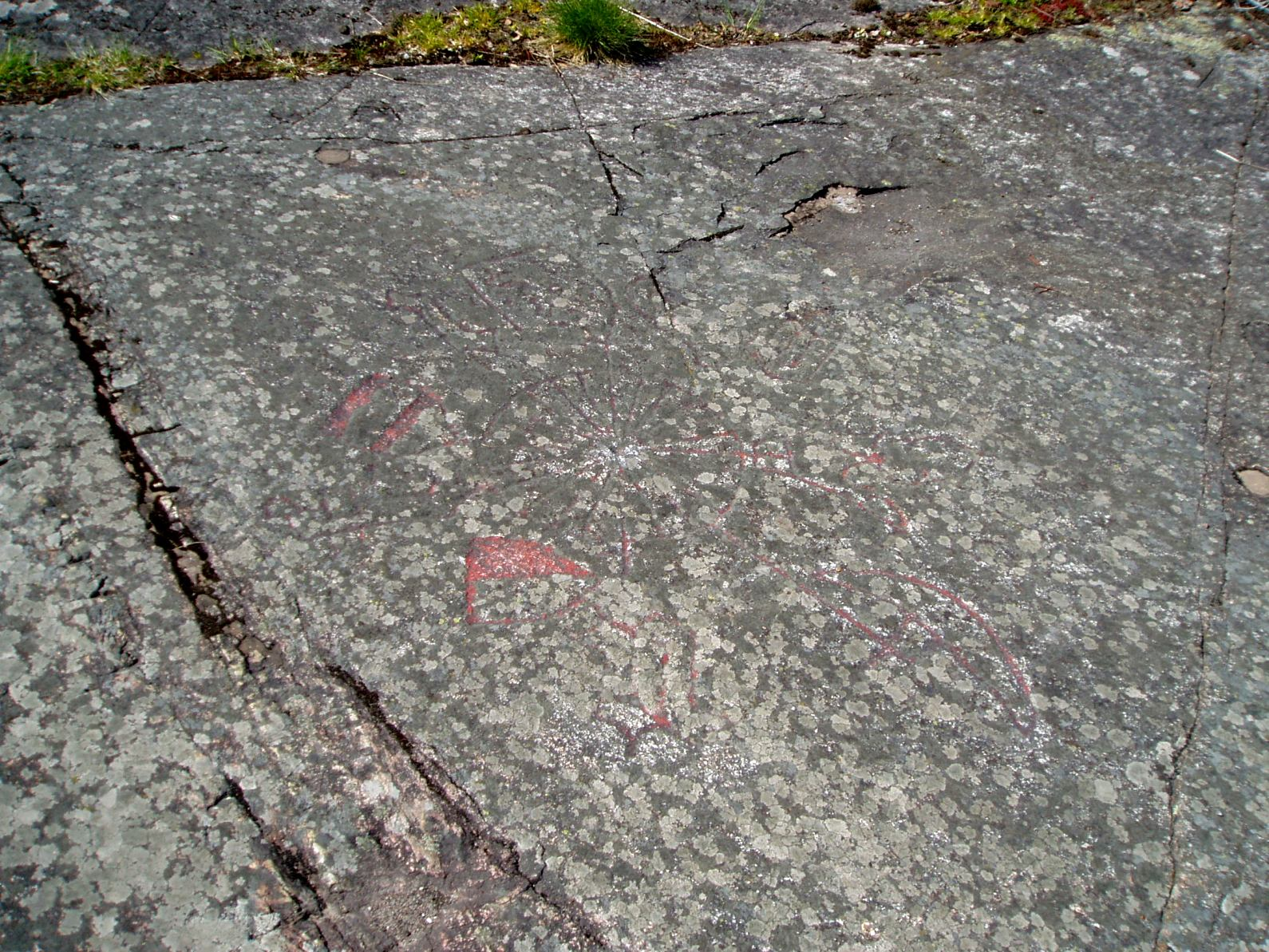 Kompassrosen på Furusund, Norrtälje.